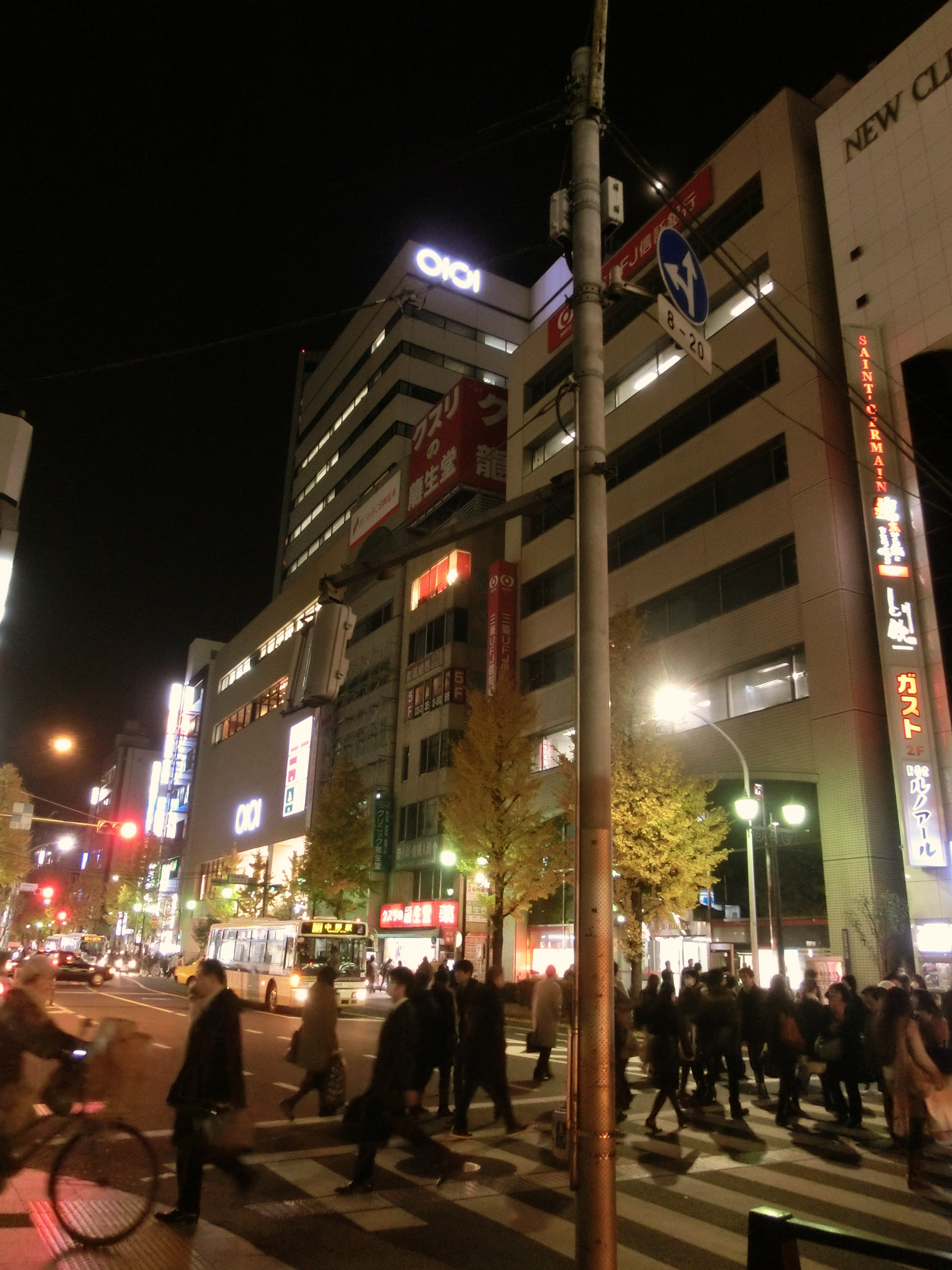 中野通り沿いにあるOIOI中野本店前の横断歩道